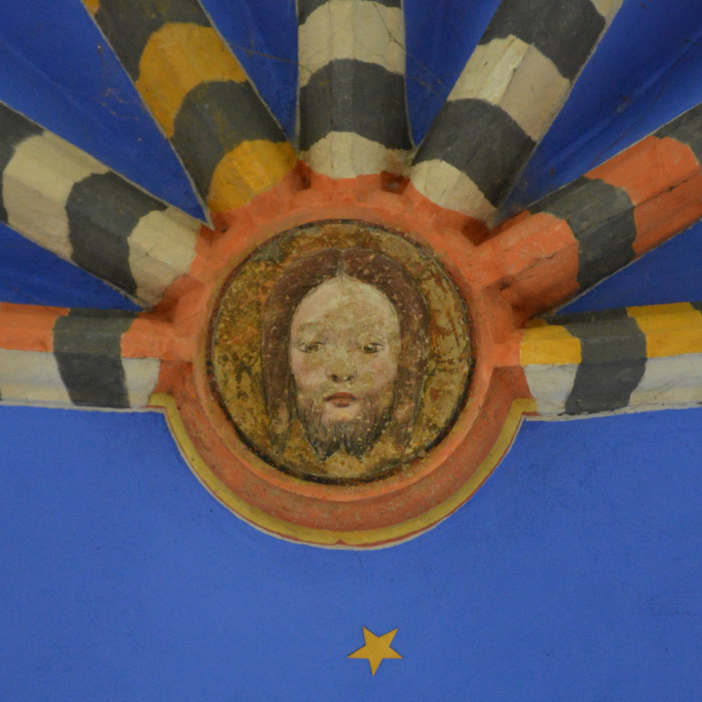 Grins, Martinytsjerke, slútstien koer